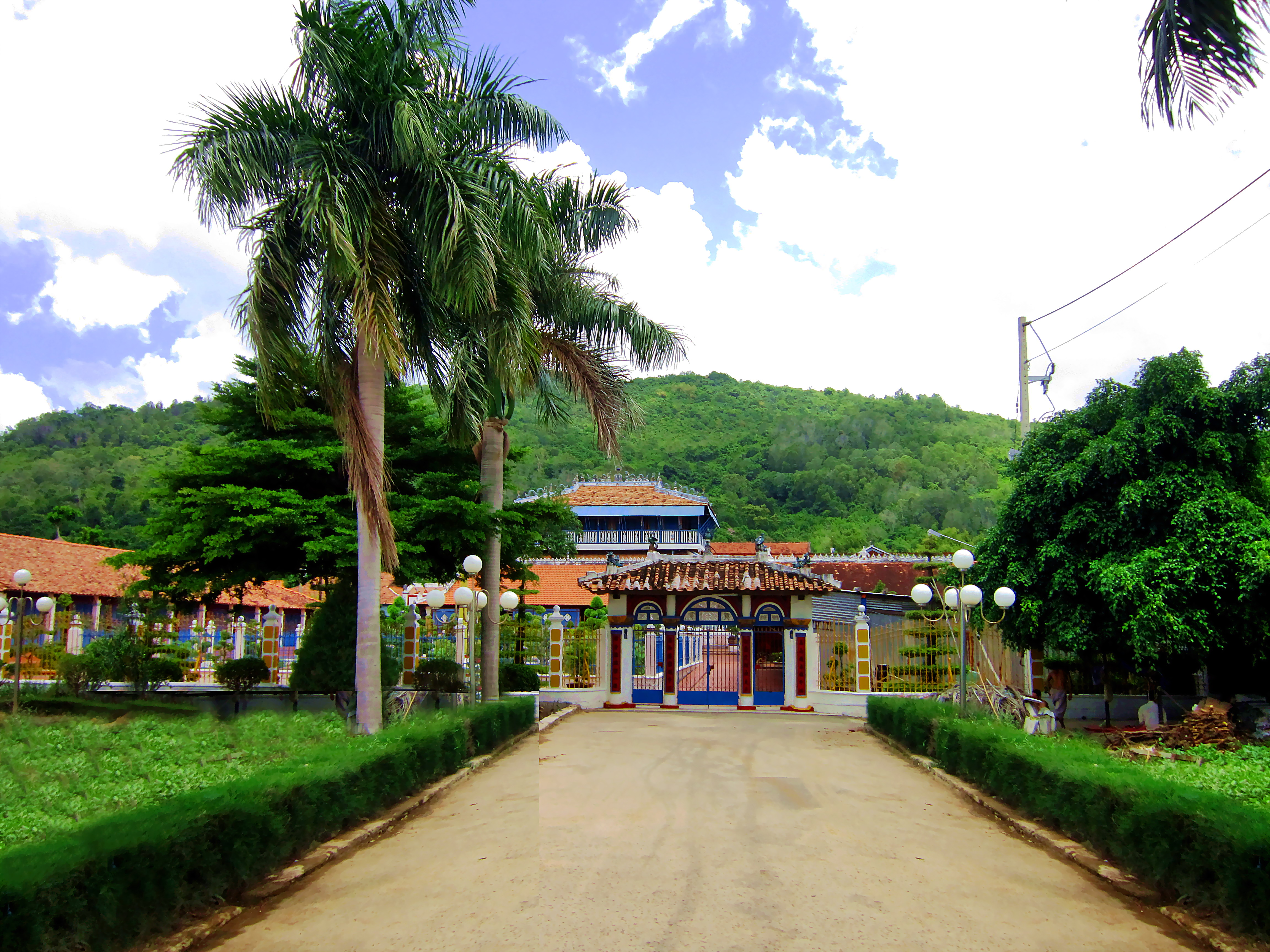 Đền Ông Trần (còn gọi là Nhà Lớn Long Sơn) ở Long Sơn, thuộc thành phố Vũng Tàu, tỉnh Bà Rịa - Vũng Tàu, Việt Nam.